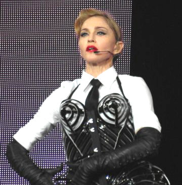 Madonna concert in Barcelona